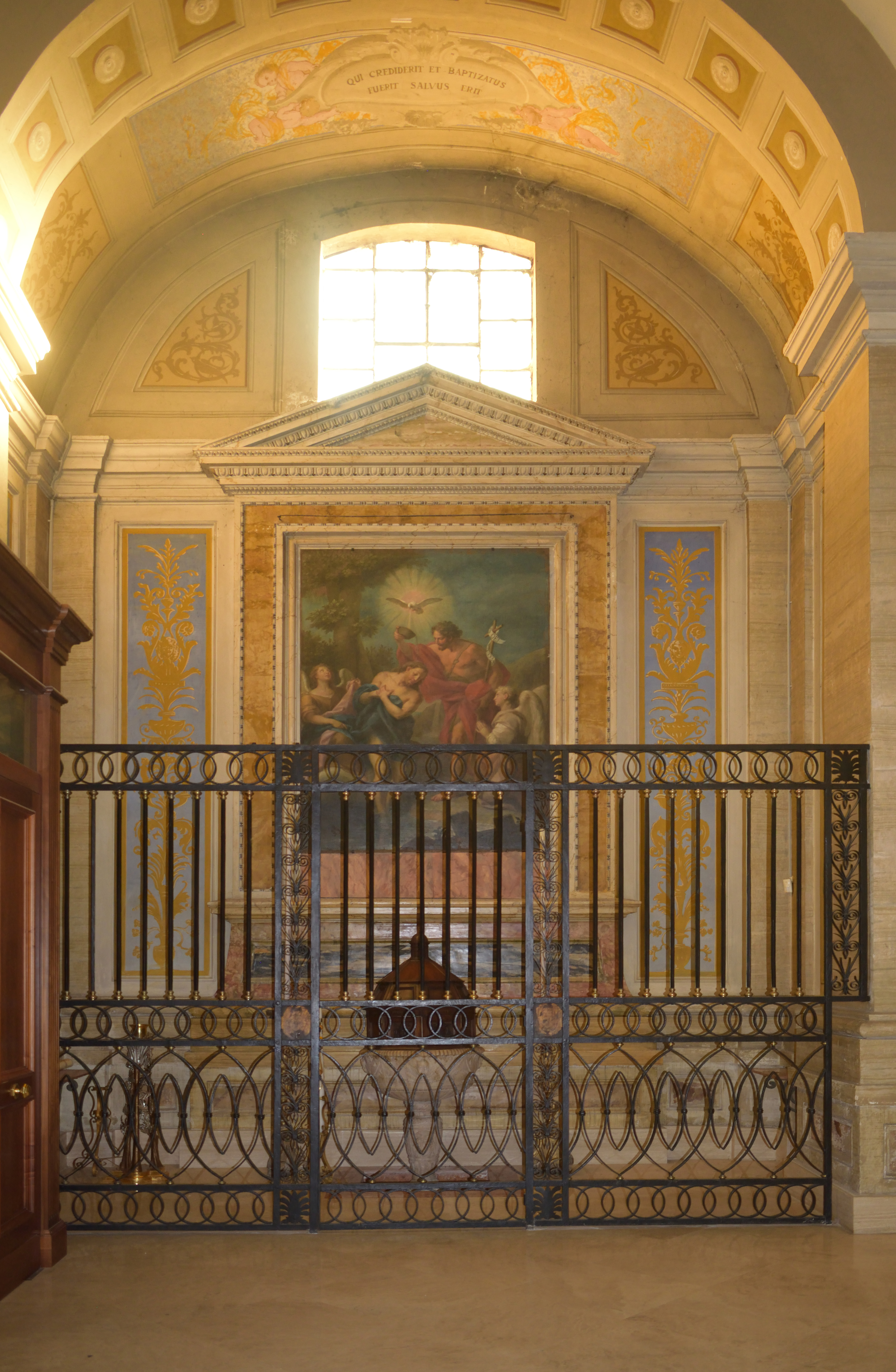 Nella prima cappella della navata di sinistra nel Duomo di Terni, commissionata dalla famiglia Tomassoni, di cui molti sono stati condottieri di Paolo III, dedicata alla madonna di Loreto è sito il Fonte Battesimale che donò il comune di Terni alla cattedrale nei primi anni del 1600 (1613-1626). Il battistero è di marmo bianco con eleganti fregi. Il comune volle scolpito nel gambo lo stemma della città insieme a quello del vescovo del tempo Mons. Clemente Gera. Oggi sopra all’altare vi è un olio su tela opera forse seicentesca che rappresenta il battesimo di Cristo. La scena è intensa, dominata dalla colomba dello spirito santo e delimitata da due angeli alati. Cristo esprime la sua dolce giovinezza a confronto con la solennità dell’adulto Battista coinvolto nella sua importante mansione.